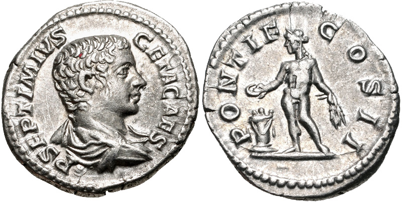 Geta. As Caesar, AD 198-209. AR Denarius (19mm, 3.67 g, 6h). Rome mint. Struck AD 208. Bareheaded and draped bust right / Genius standing facing, head left, sacrificing from patera over lighted altar and holding grain ears. RIC IV 59a; RSC 114a. Near EF, lightly toned, short flan crack.